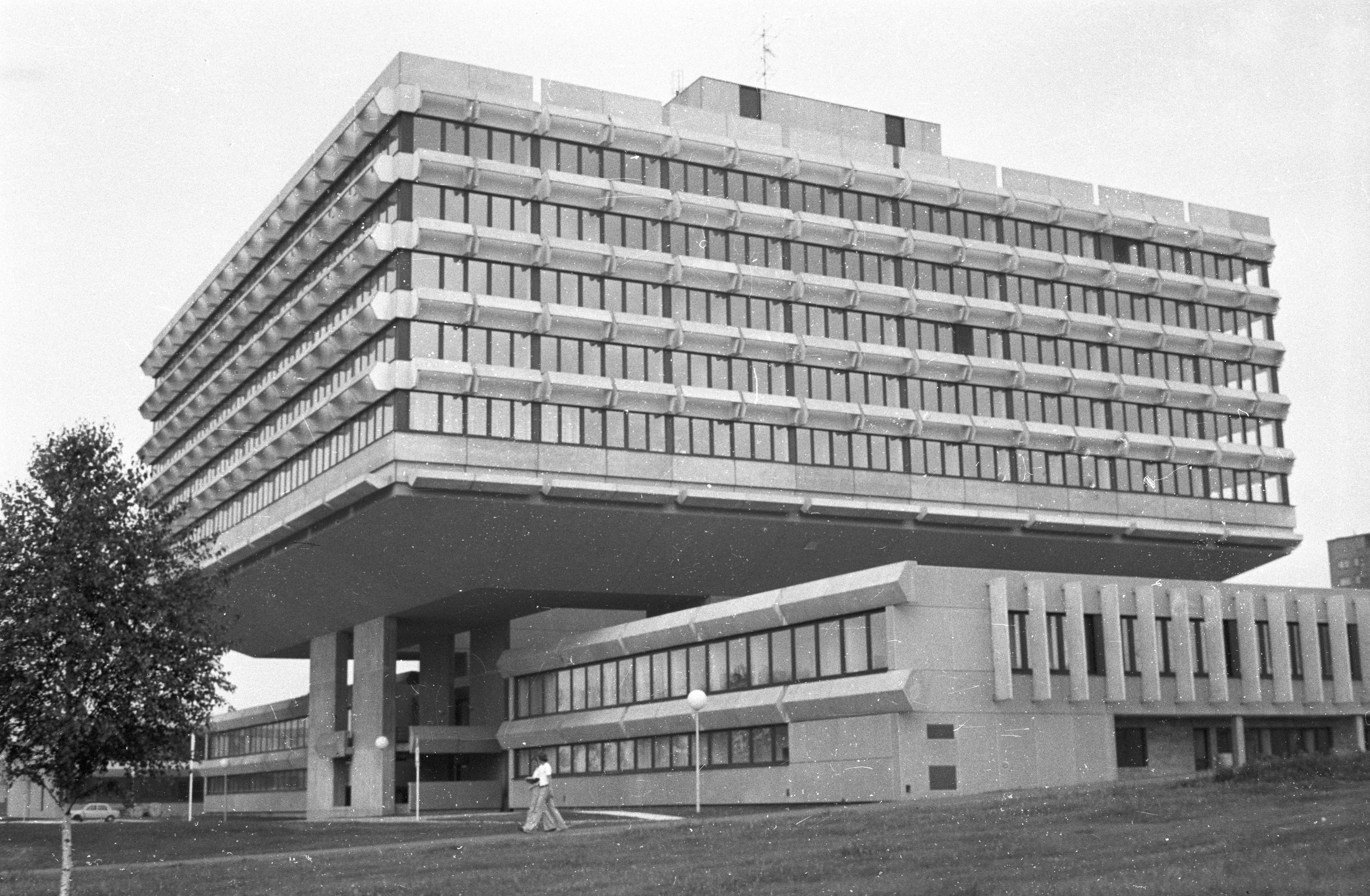 Česky: Budova Koospolu v Praze 6 těsně po dokončení v roce 1977